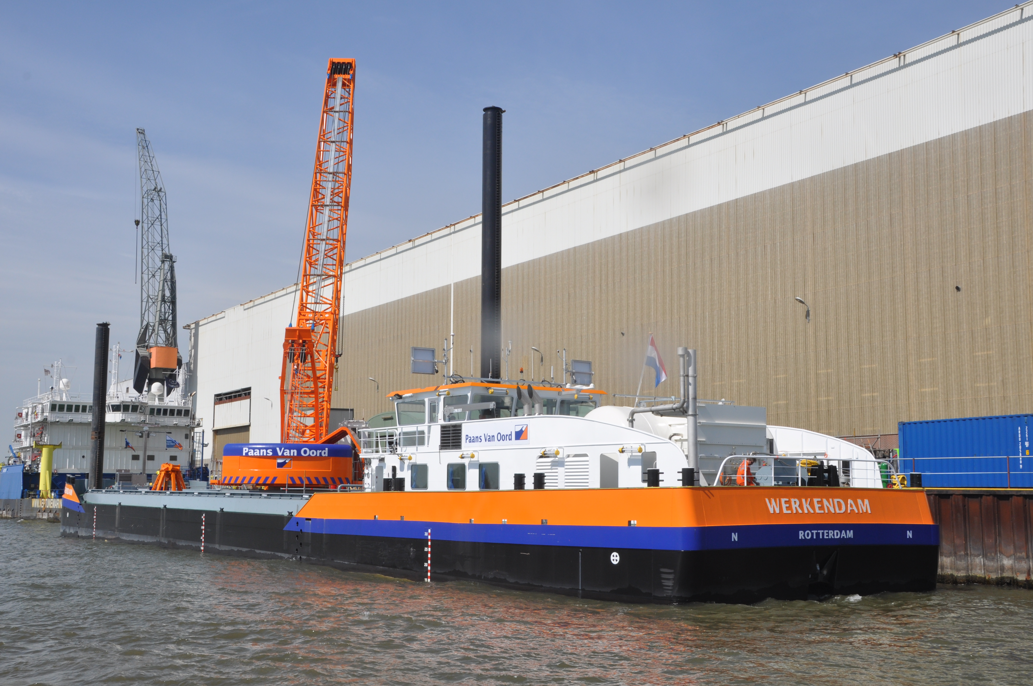 De WERKENDAM voor de wal bij de werf in Hardinxveld-Giessendam.